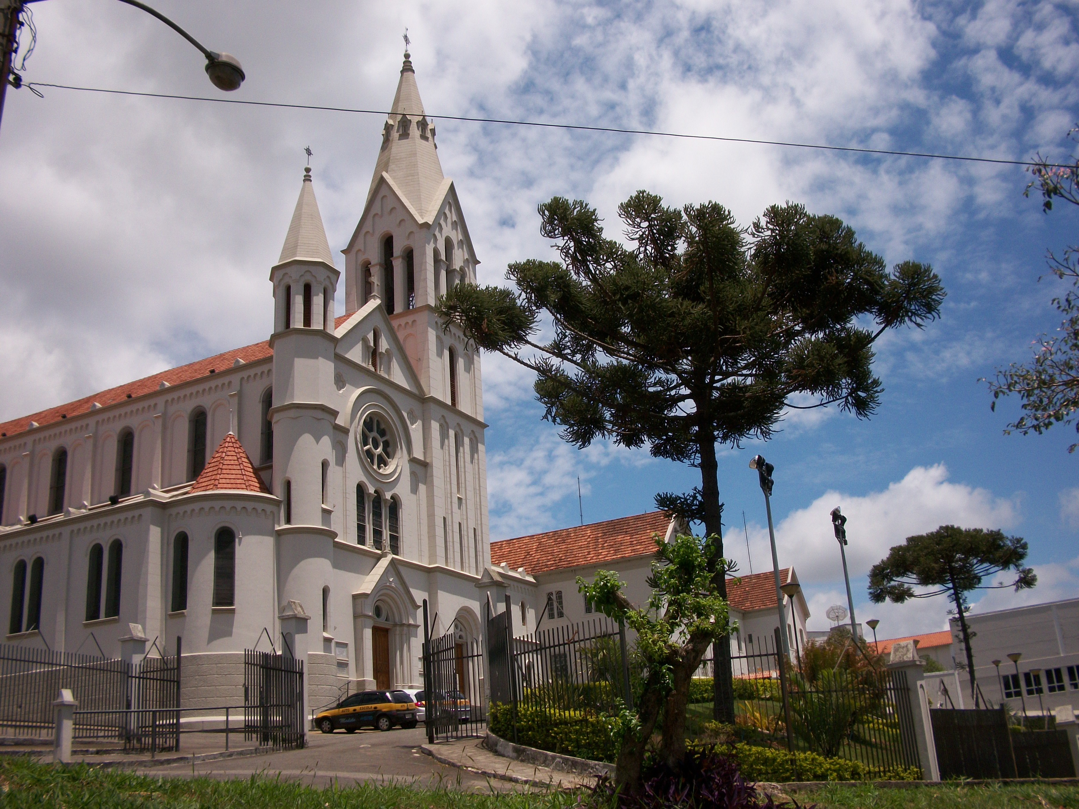 Paróquia de Nossa Senhora da Glória. Cidade de Juiz de Fora - Minas Gerais - Brasil